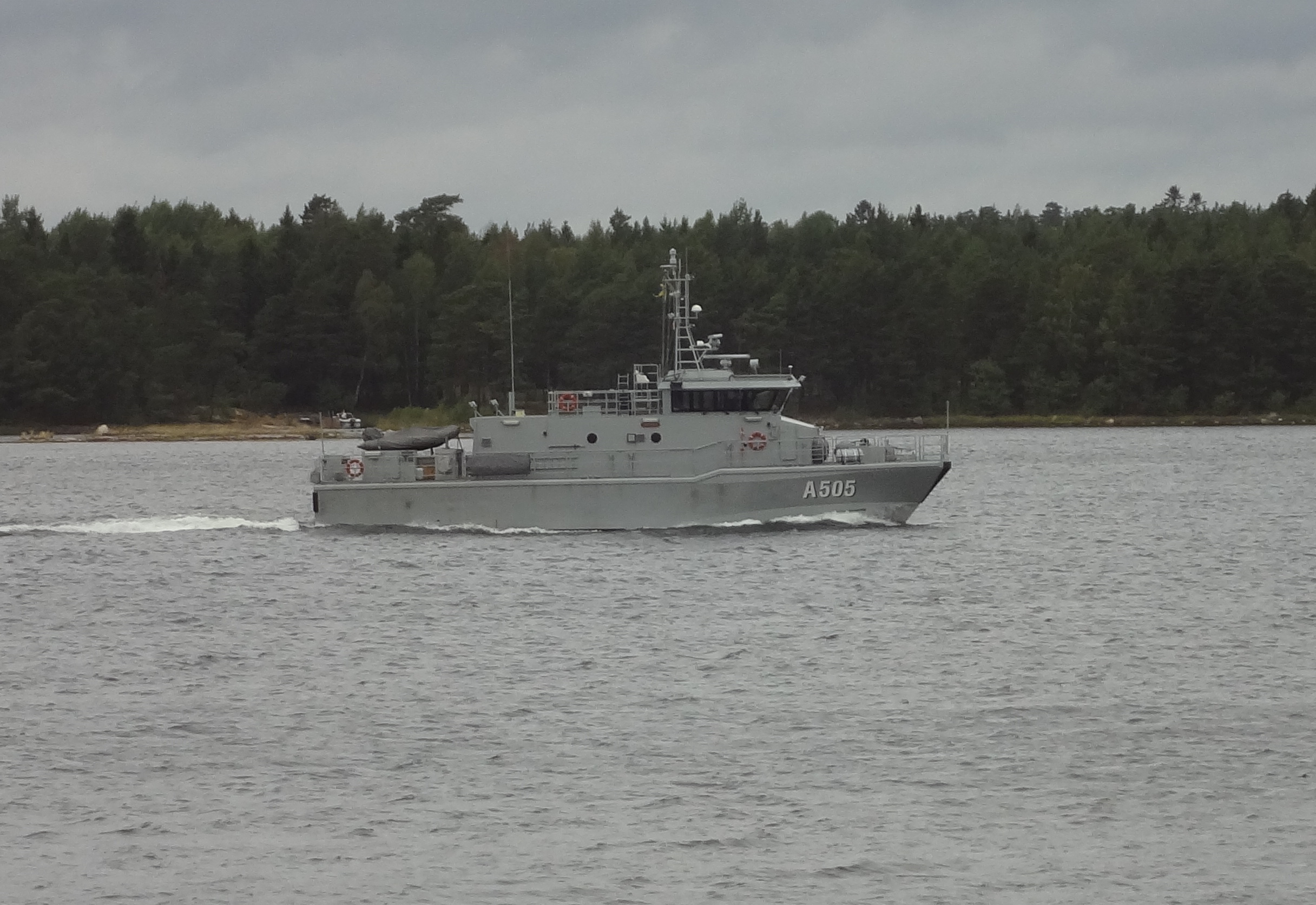 Marinens skolskepp HMS Astrea (A505) i Stockholms skärgård augusti 2014.